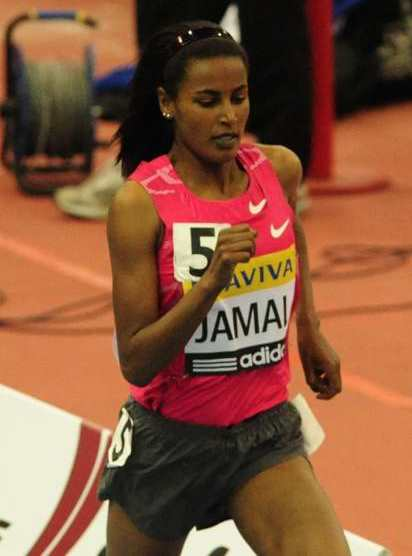 Maryam Jamal AVIVA GRAND PRIX - Birmingham